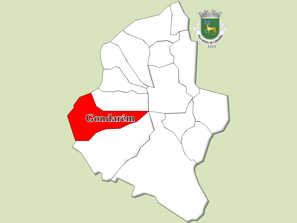 Censos 1864/2011